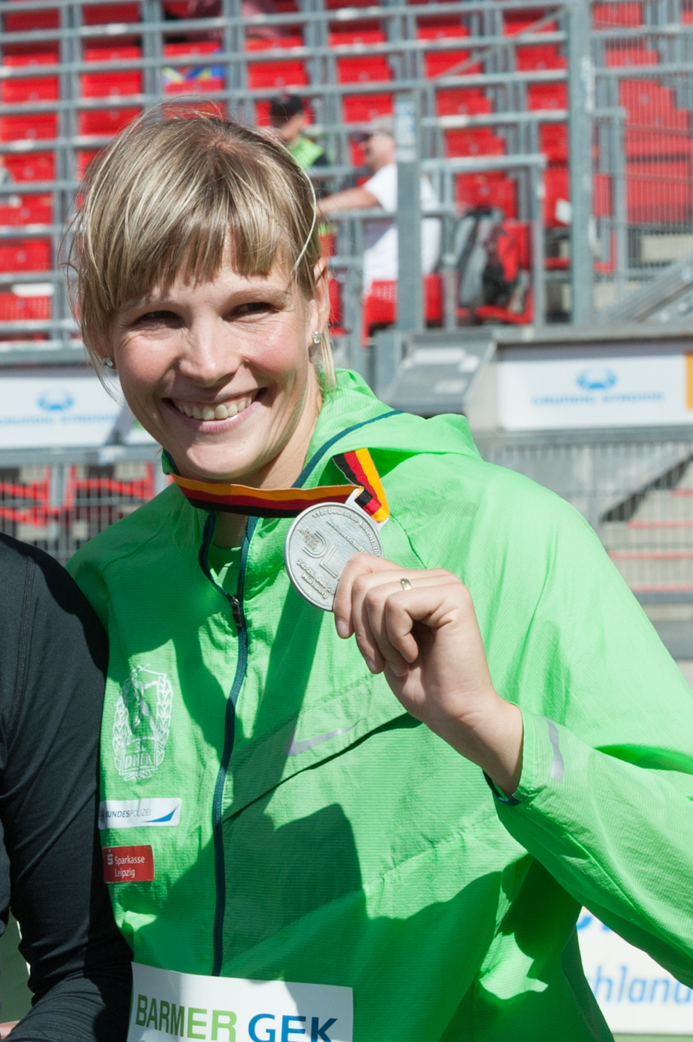 Deutsche Leichtathletik-Meisterschaften 2015: Frauen Diskuswurf - Nadine Müller, SC DHFK Leipzig